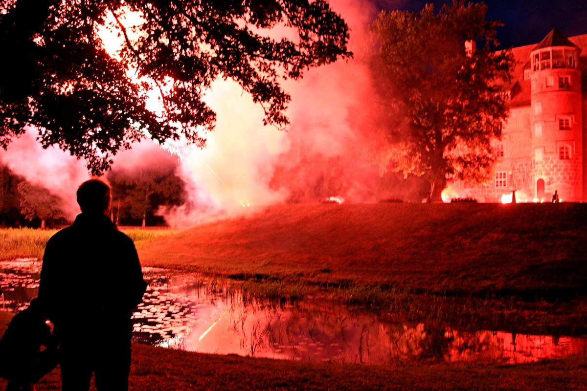 Schloss Ulrichshusen im Feuerwerk